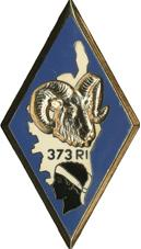 Insigne régimentaire du 373e régiment d'infanterie.